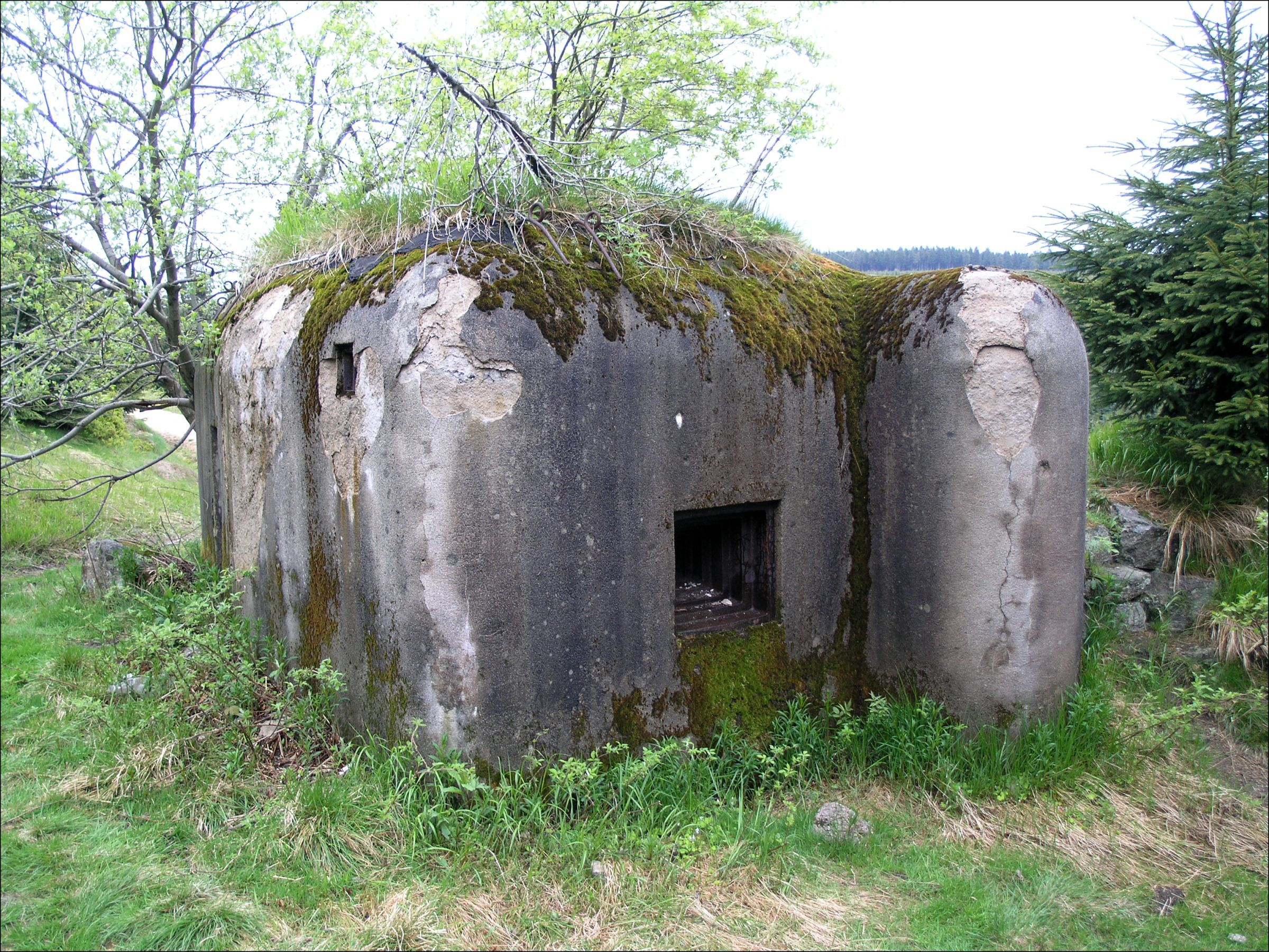 Řopík v Jizerských horách